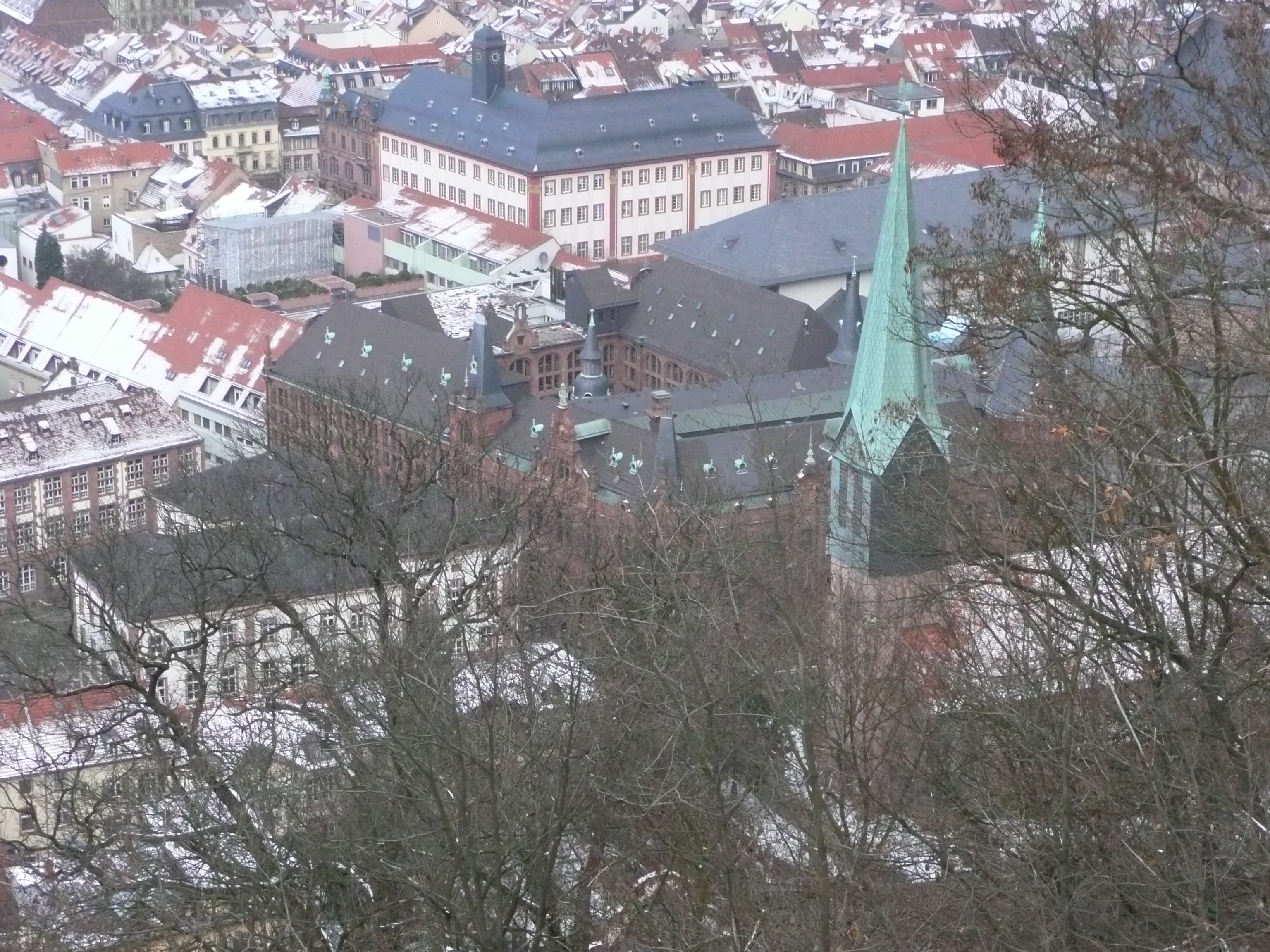 Blick von der Aussichtskanzel Riesenstein auf die Heidelberger Altstadt (Universitätsbibliothek, Alte Universität, Peterskirche ...) (Baden-Württemberg, Deutschland)